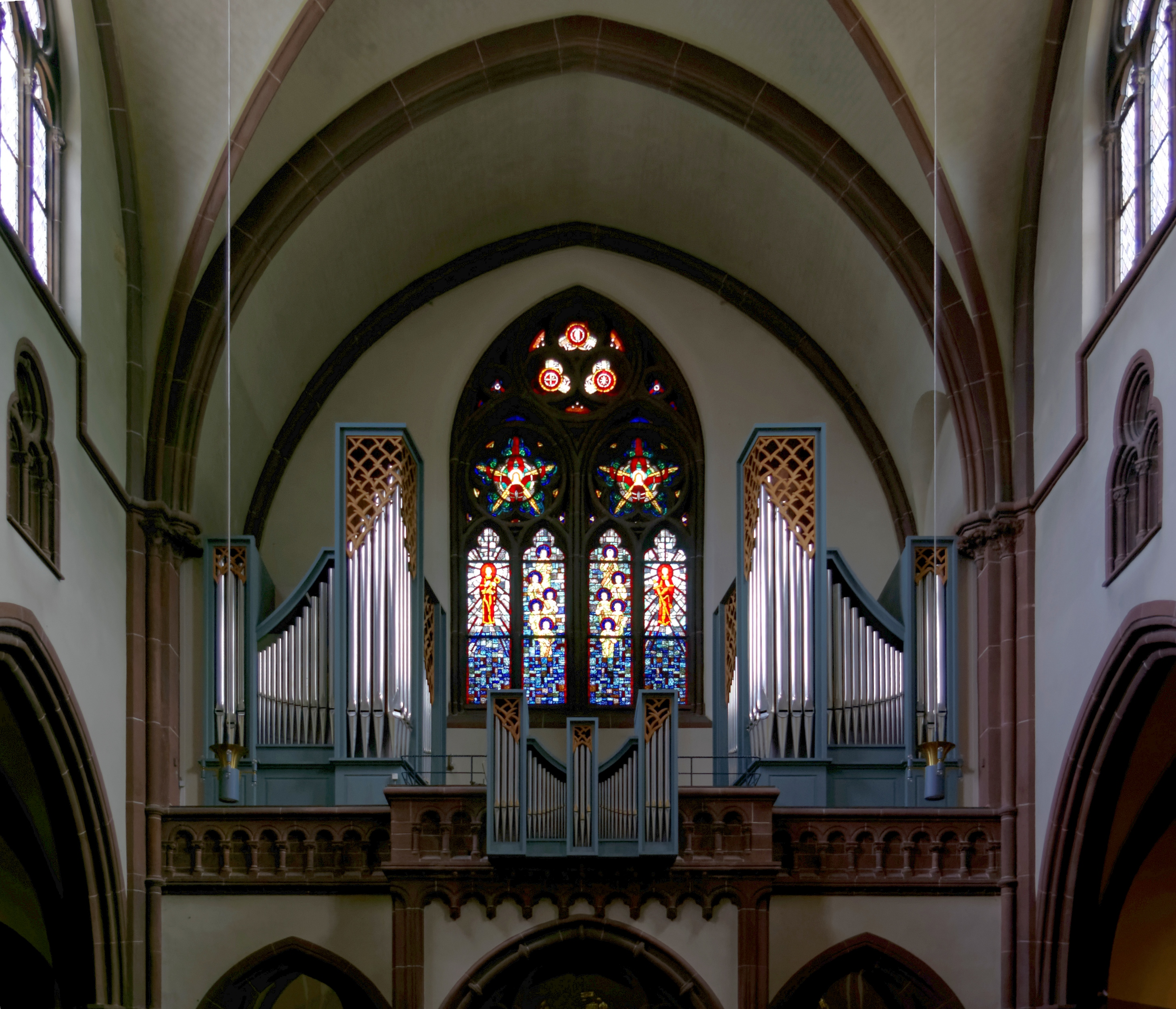 Heppenheim, St. Peter, Altarraum